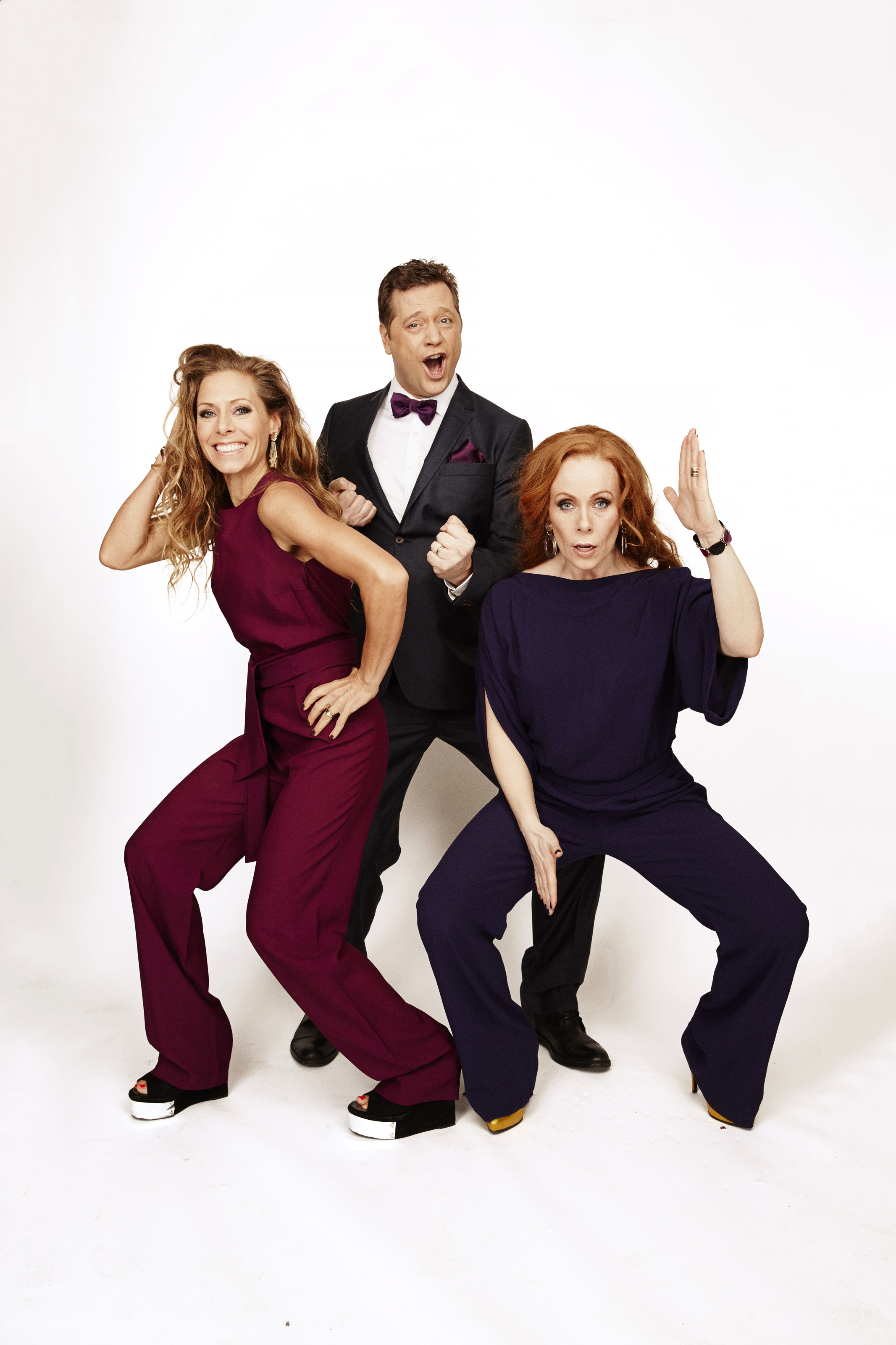 Från vänster till höger: Eva Röse, Johan Petersson och Rachel Mohlin. Pressbild för Partaj på Kanal 5.